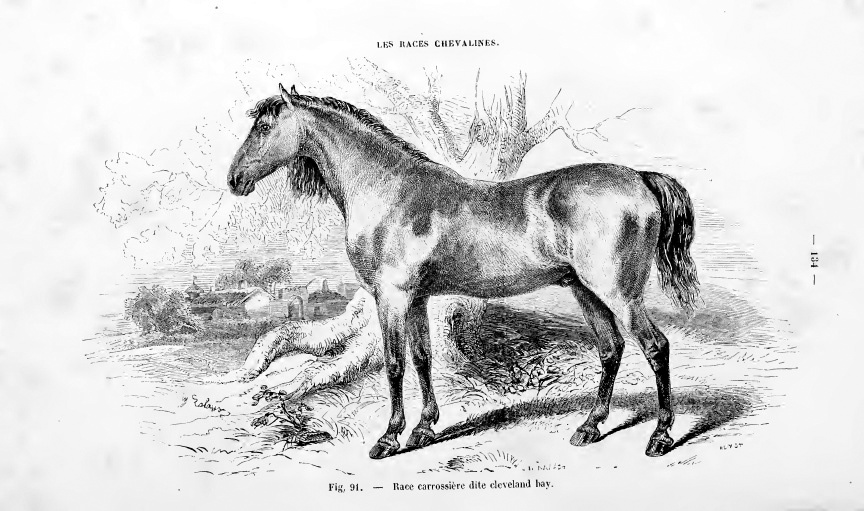 Cleveland Bay